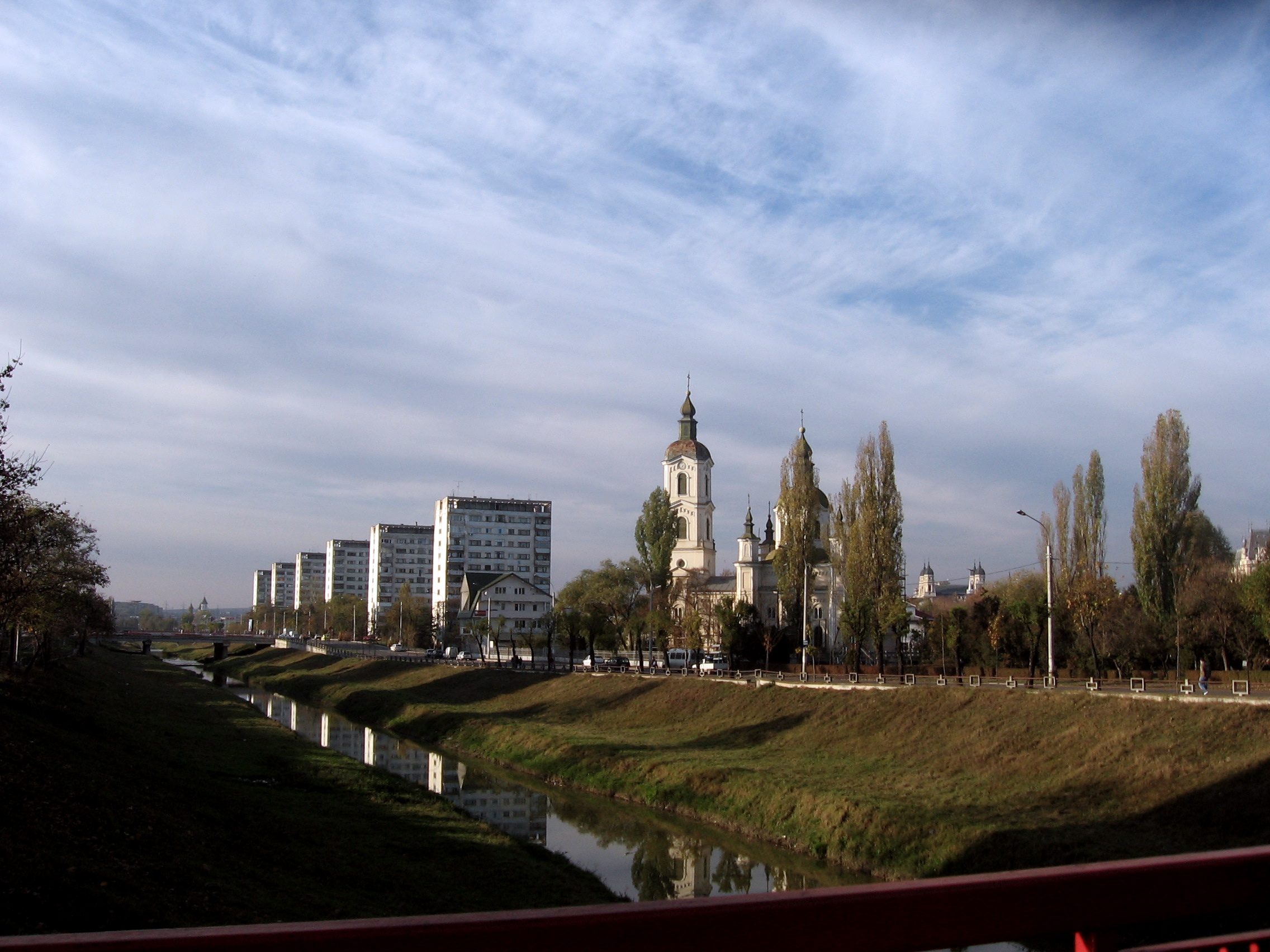 Daniela Hututui, 2006-11-01, canon pwershot a520